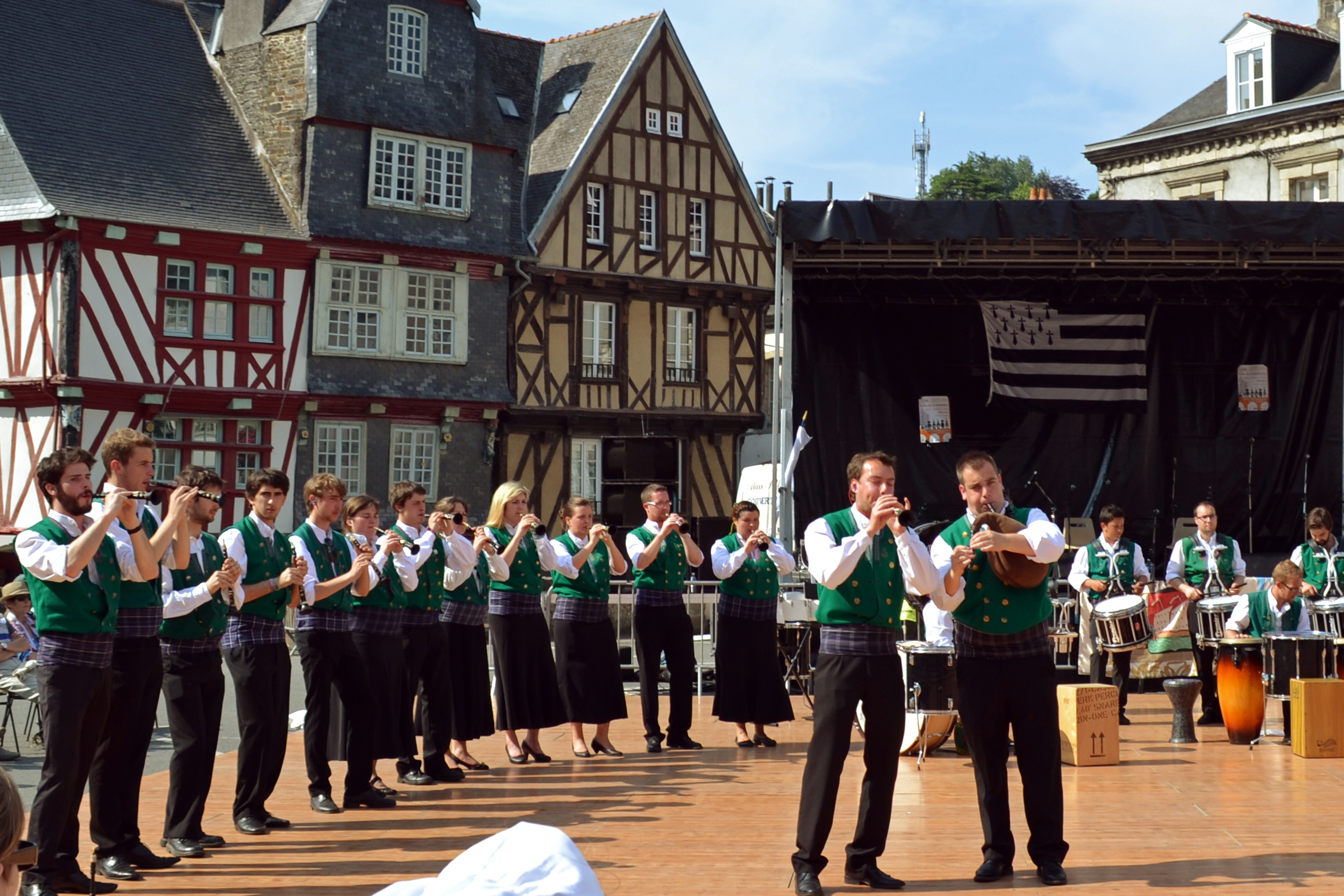 Le Bagad Plougastell à Morlaix le 7 juillet 2013.